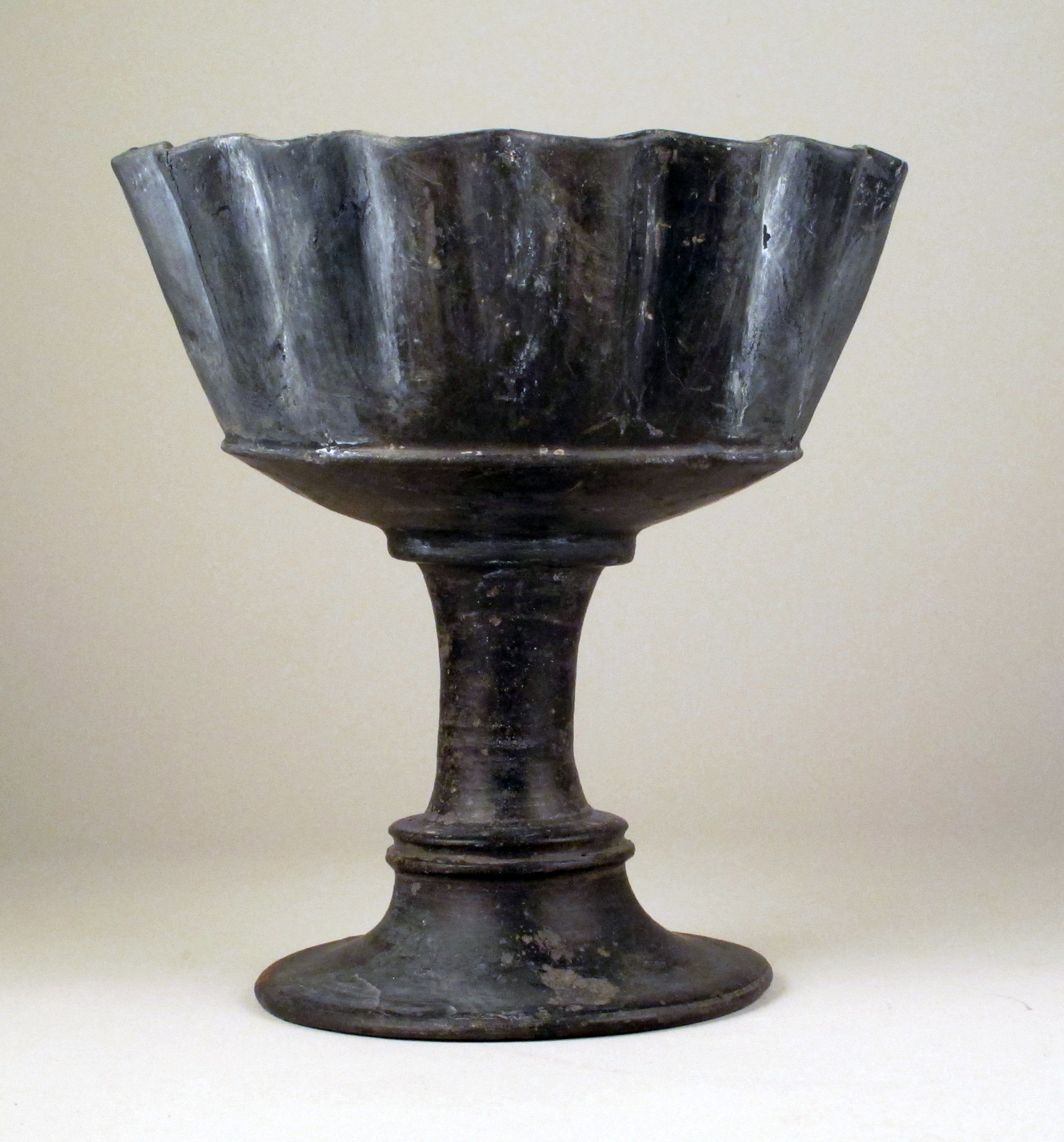 Etruscan; Cup; Vases